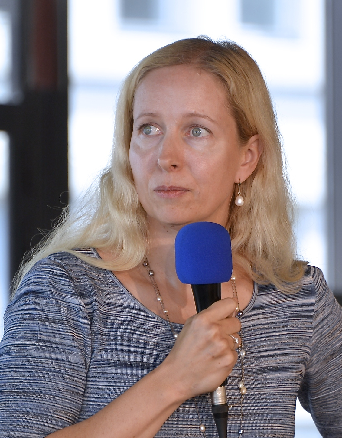 Anna Dahlberg, Expressen, i Ekots lördagsintervju inför valet i september. 30 augusti 2014 på Kulturhuset i Stockholm.